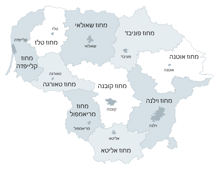 מפת מחוזות ליטא